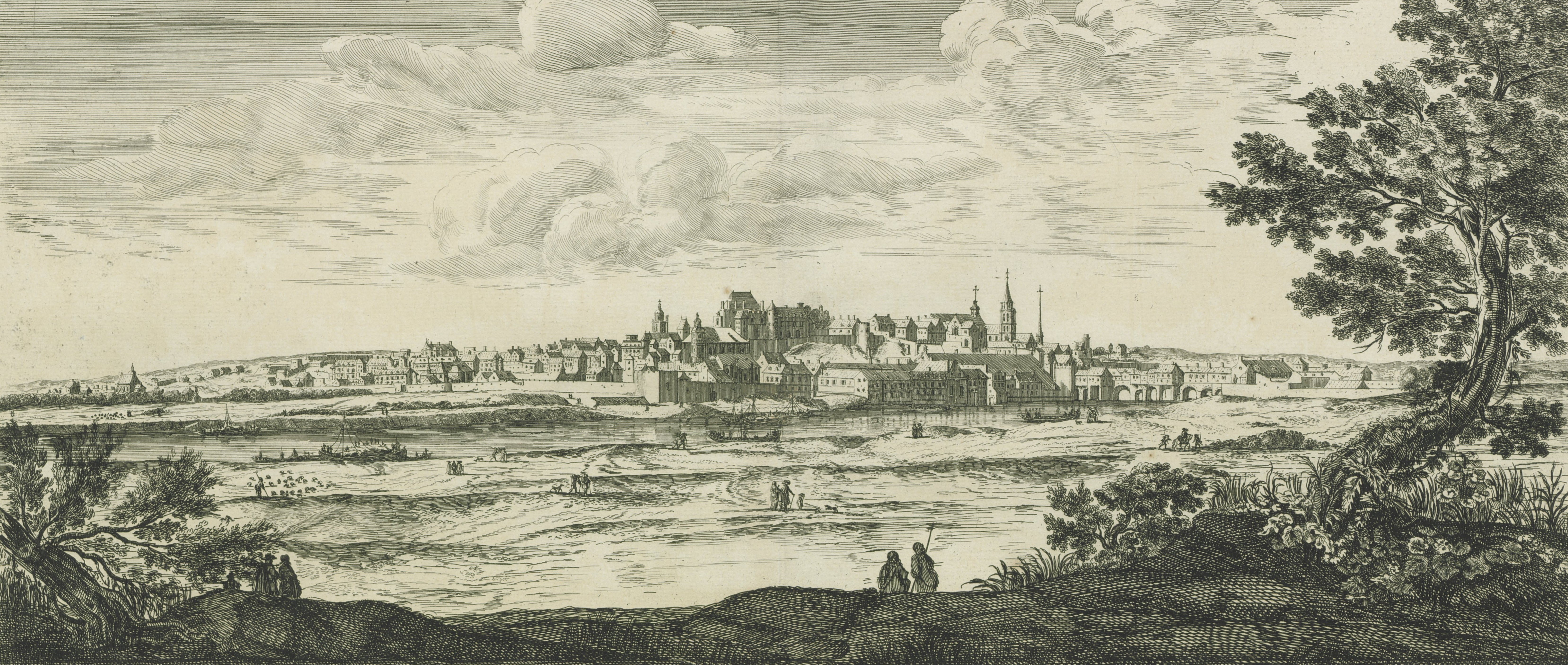 Profil de la ville de Pontoise.